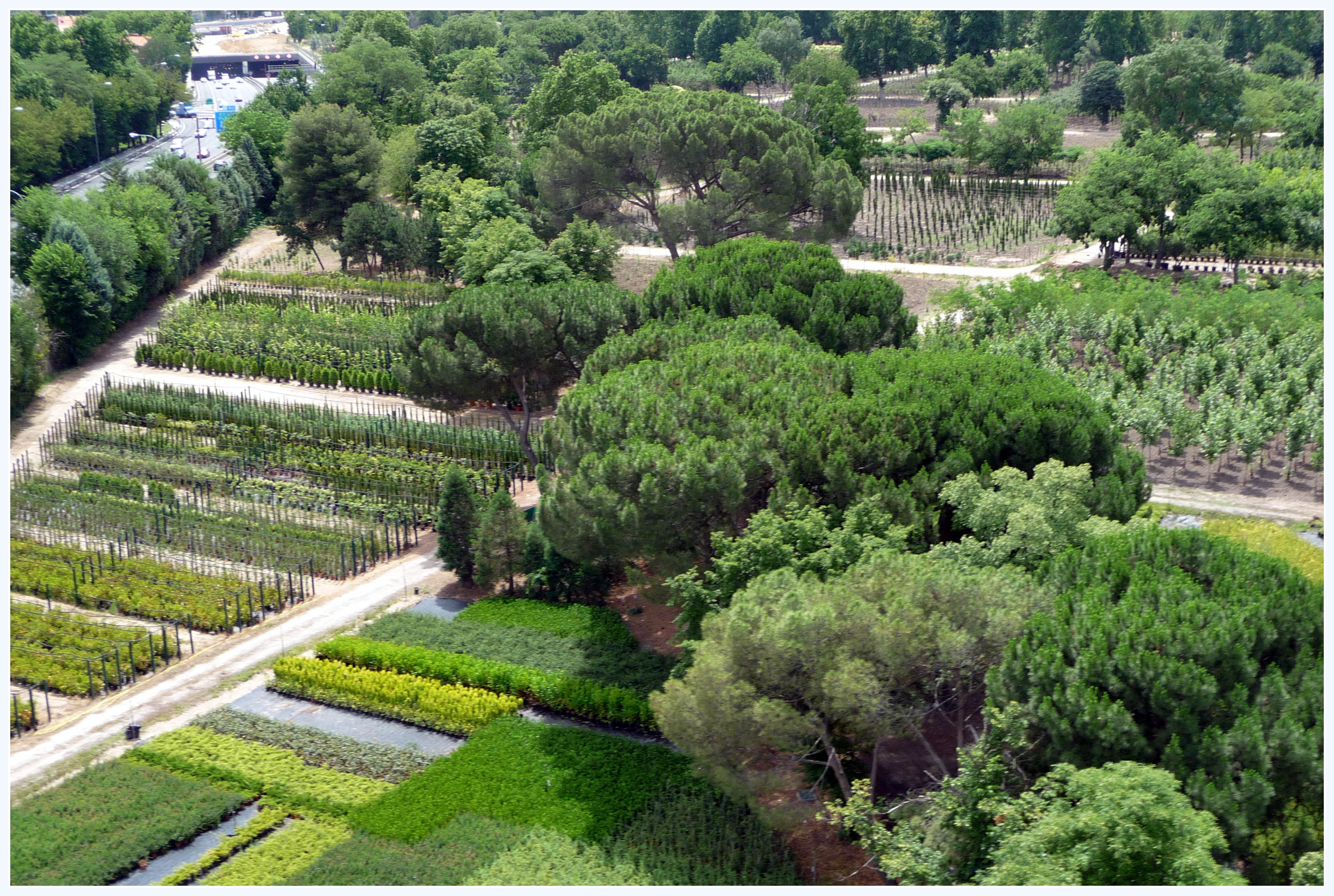 o alrededores (paseo de Rosales, Casa de Campo...)